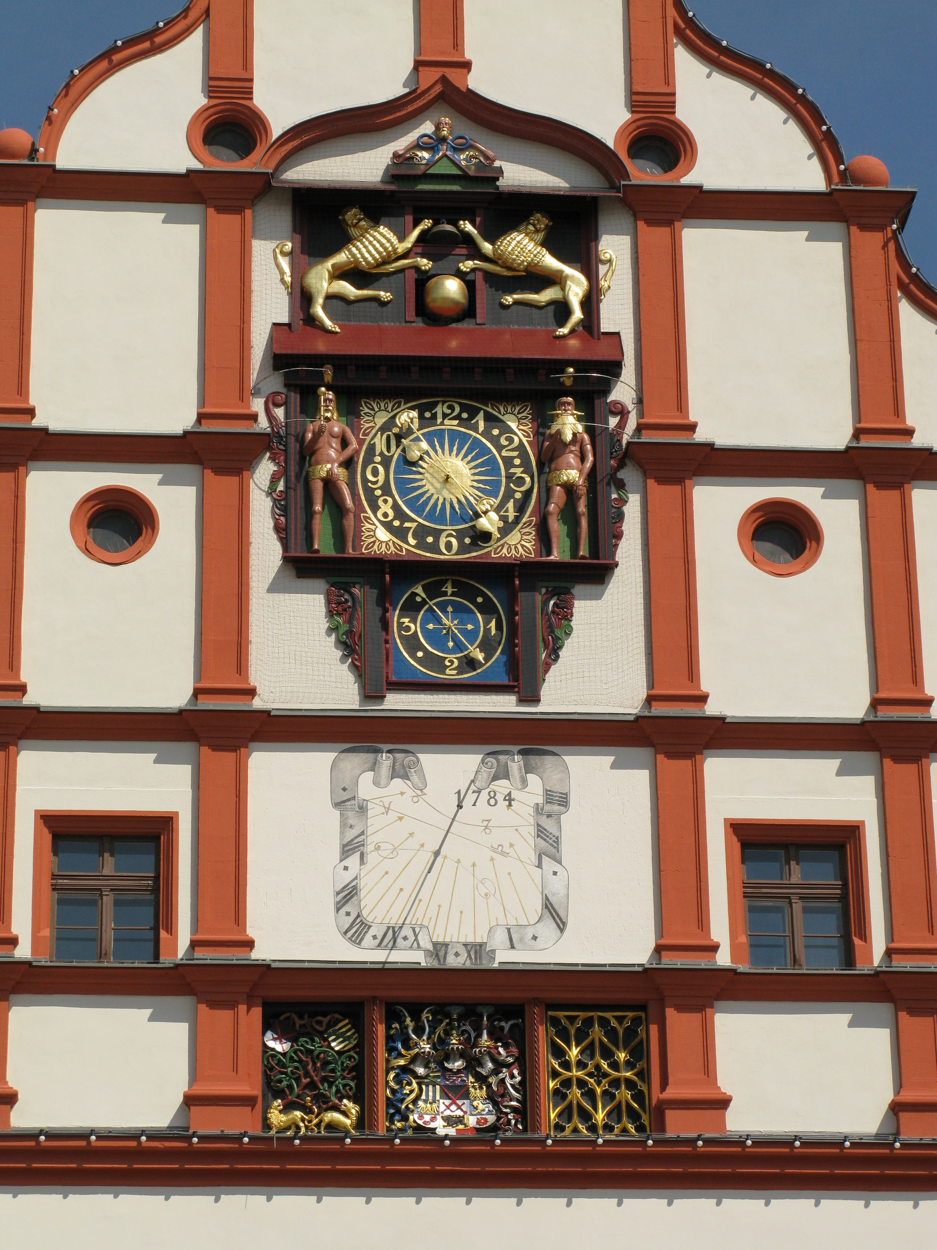 Die restaurierte Kunstuhr am Alten Rathaus in Plauen